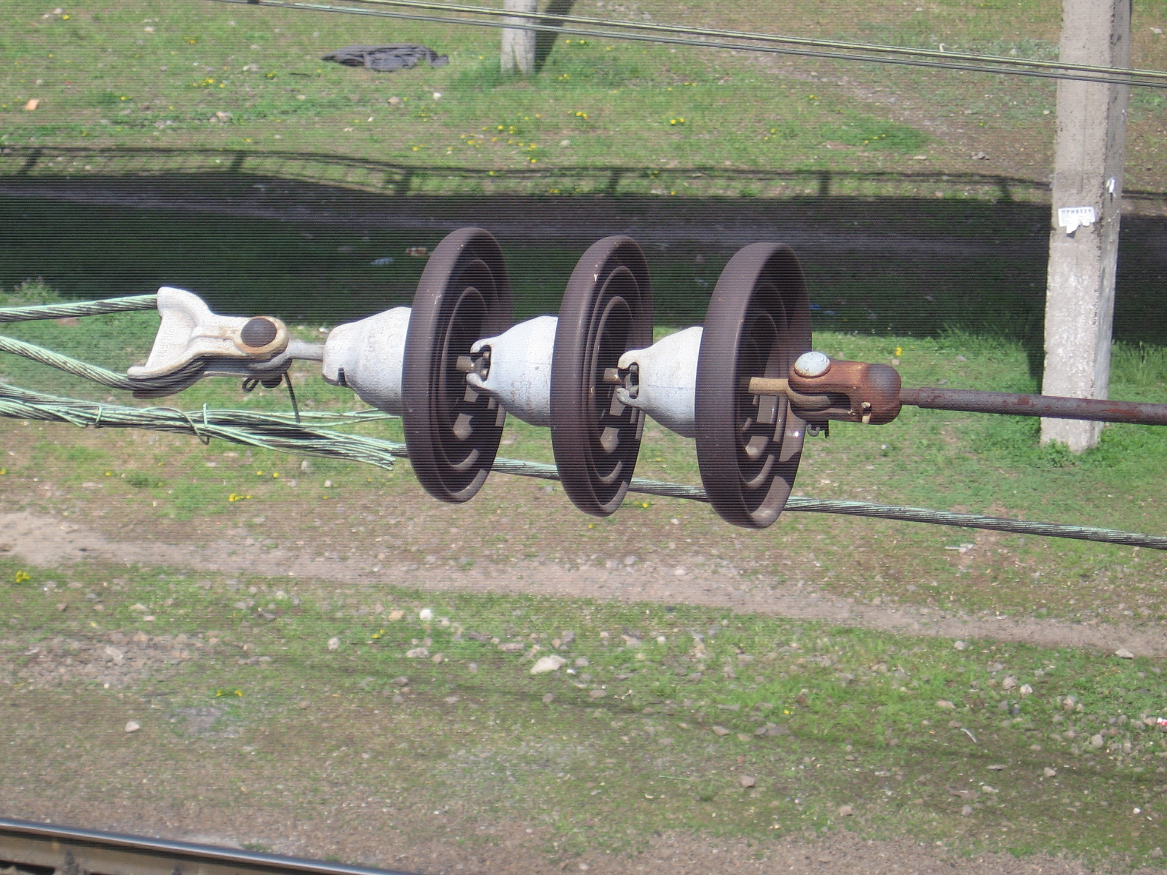 Ізолятор